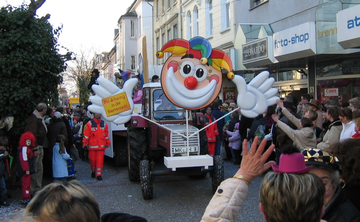 Description: Karnevalsumzug 2005 am Tulpensonntag durch die Innenstadt von Menden (Sauerland) Source: selbst fotografiert Date: 6. Feb. 2005 Author: Asio otus